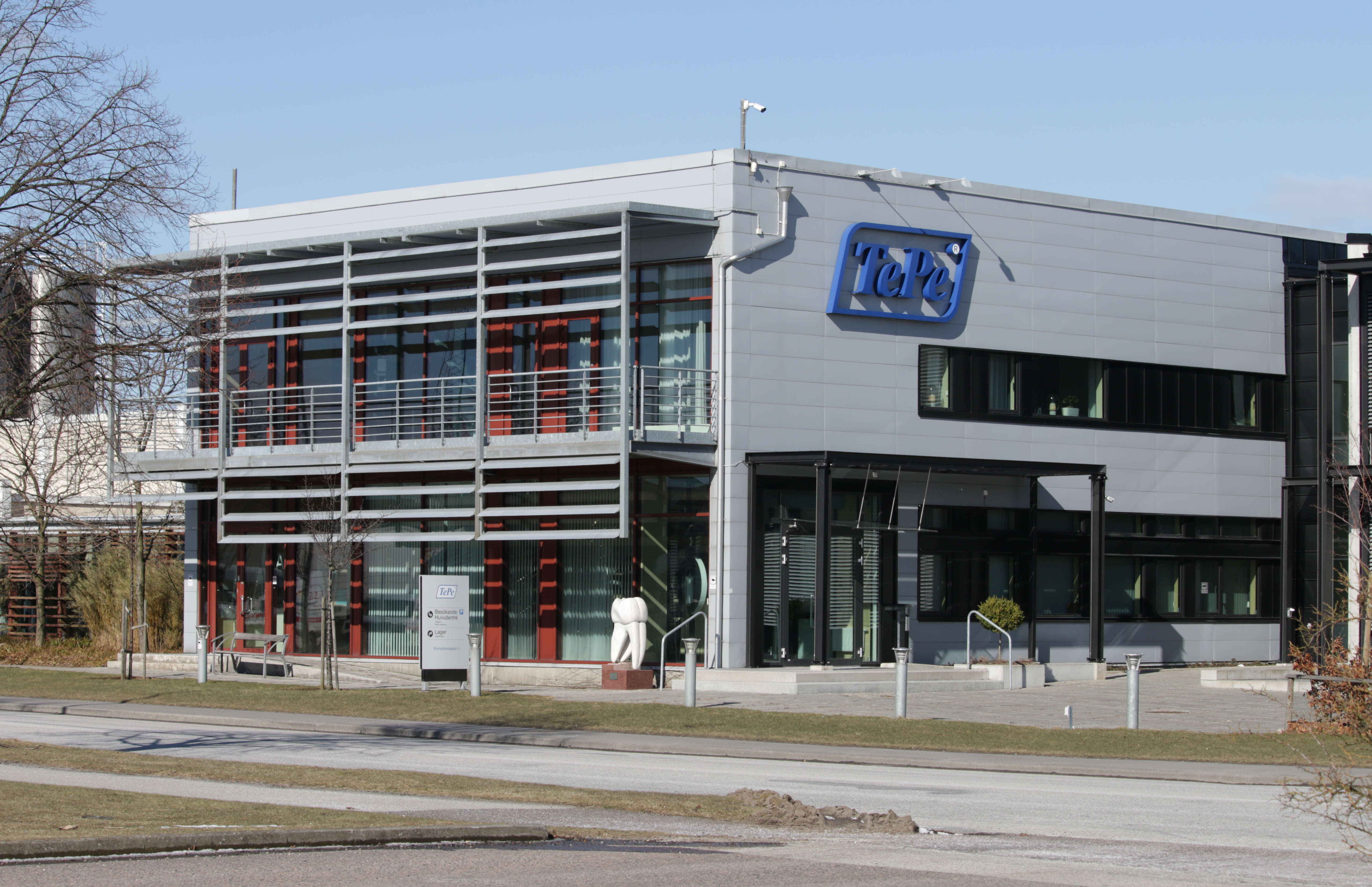 Tepe huvudkontor